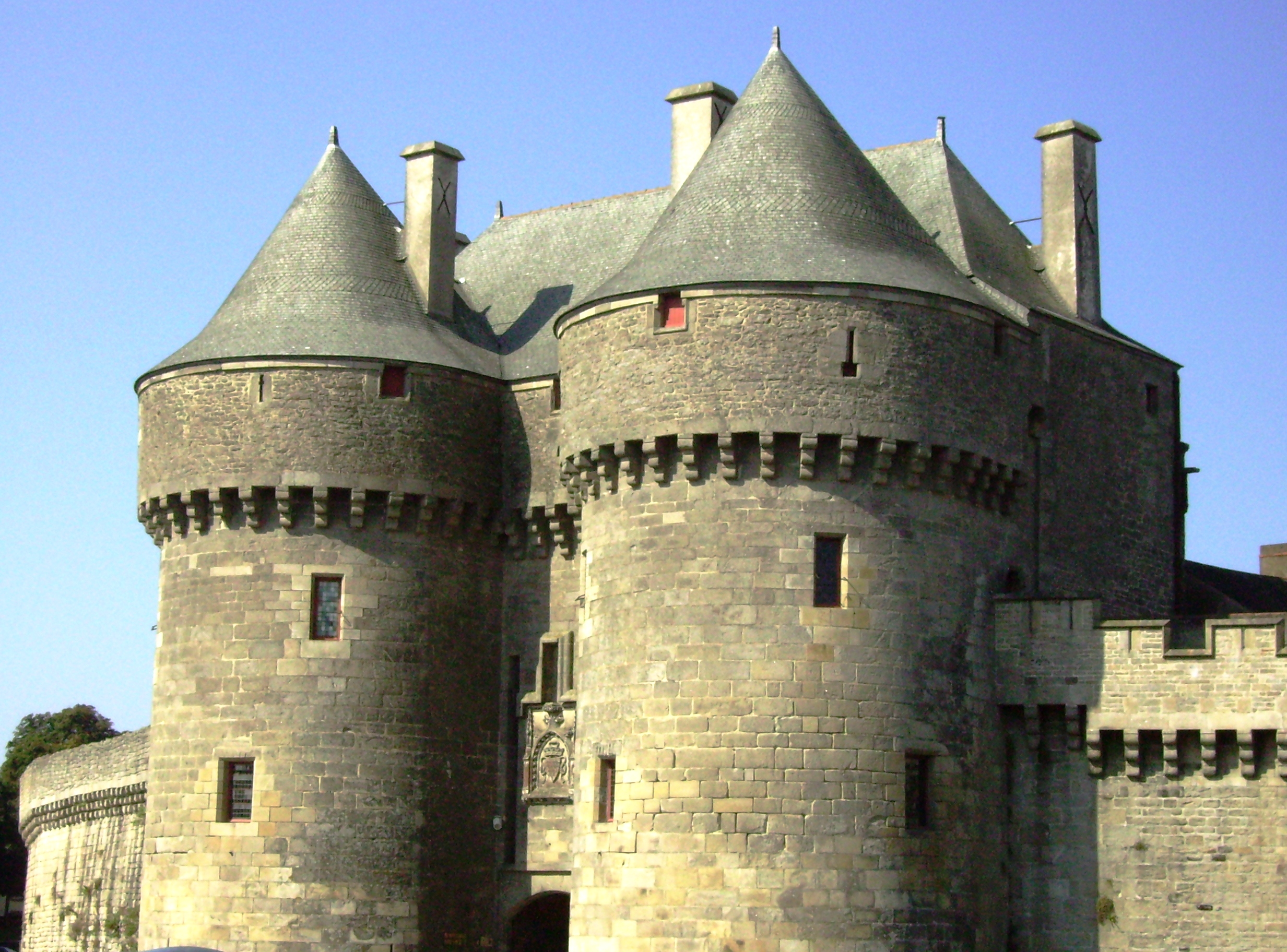 Porte St. Michel Guérande